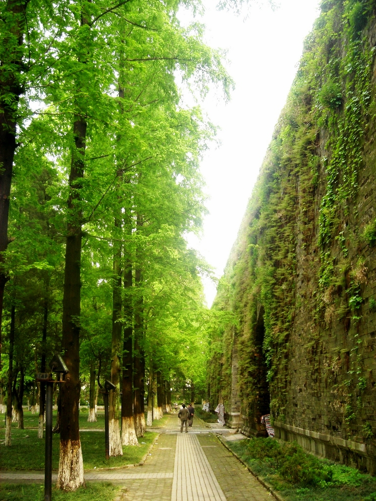 南京午朝门（明故宫）